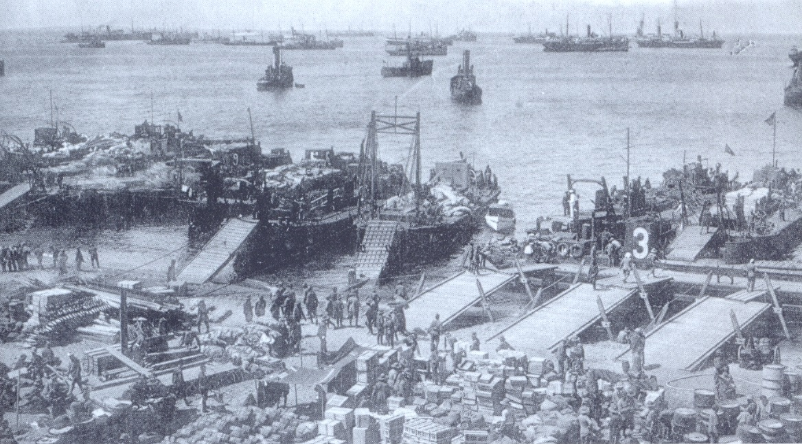 14. La playa de Morro Nuevo en los días del desembarco.